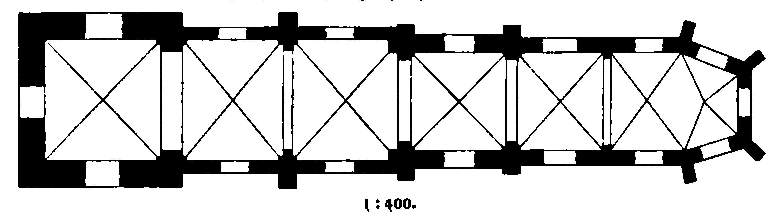 Grundriss der Kirche St. Johannis in Minden